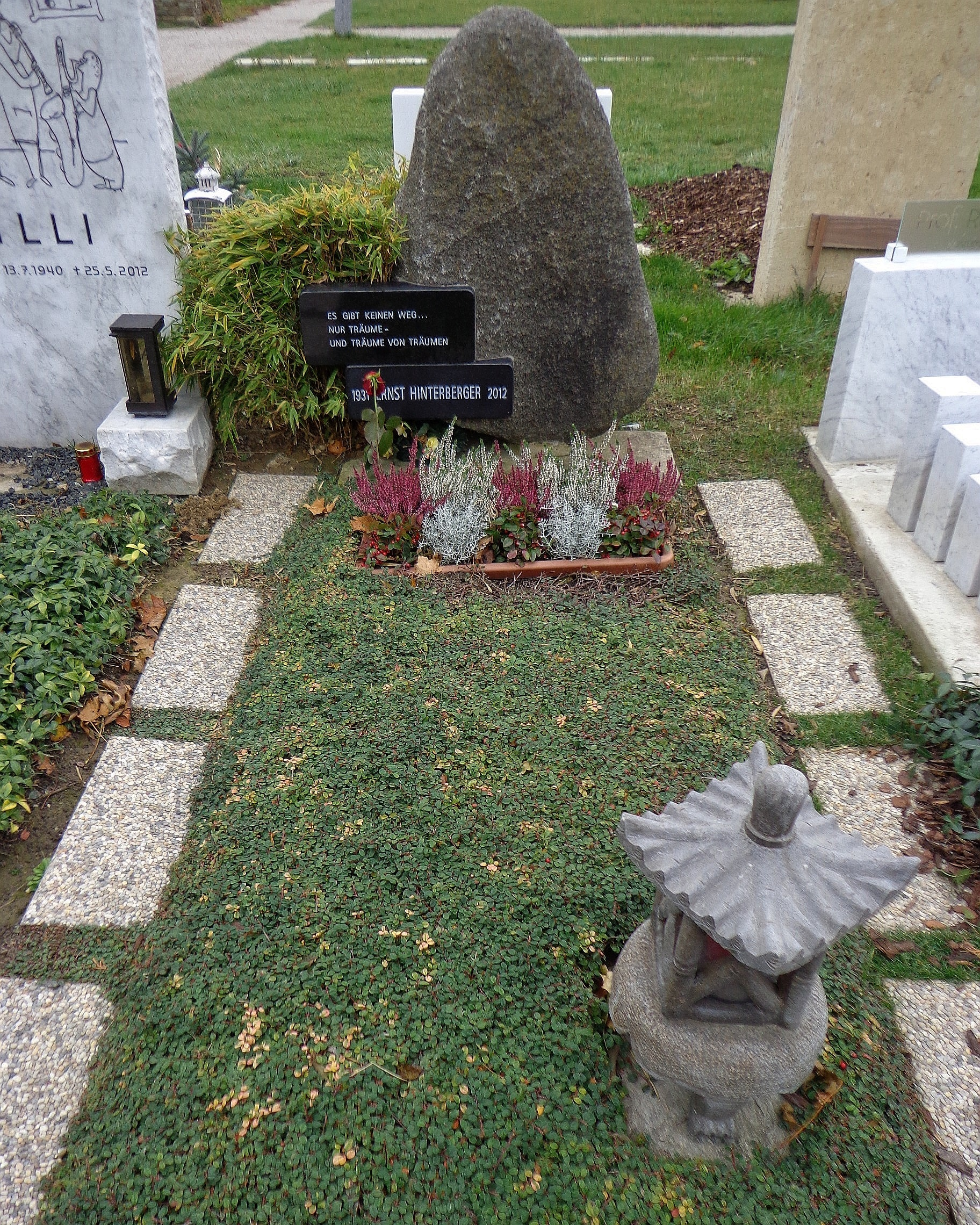 Wiener Zentralfriedhof - Gruppe 40: ehrenhalber gewidmetes Grab von Ernst Hinterberger